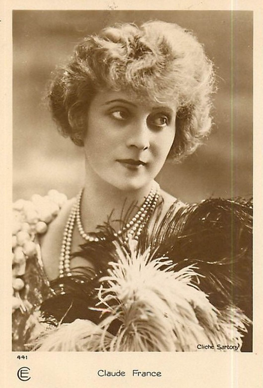 L'actrice Claude France (1893 - 1928) vers 1927, par Sartony